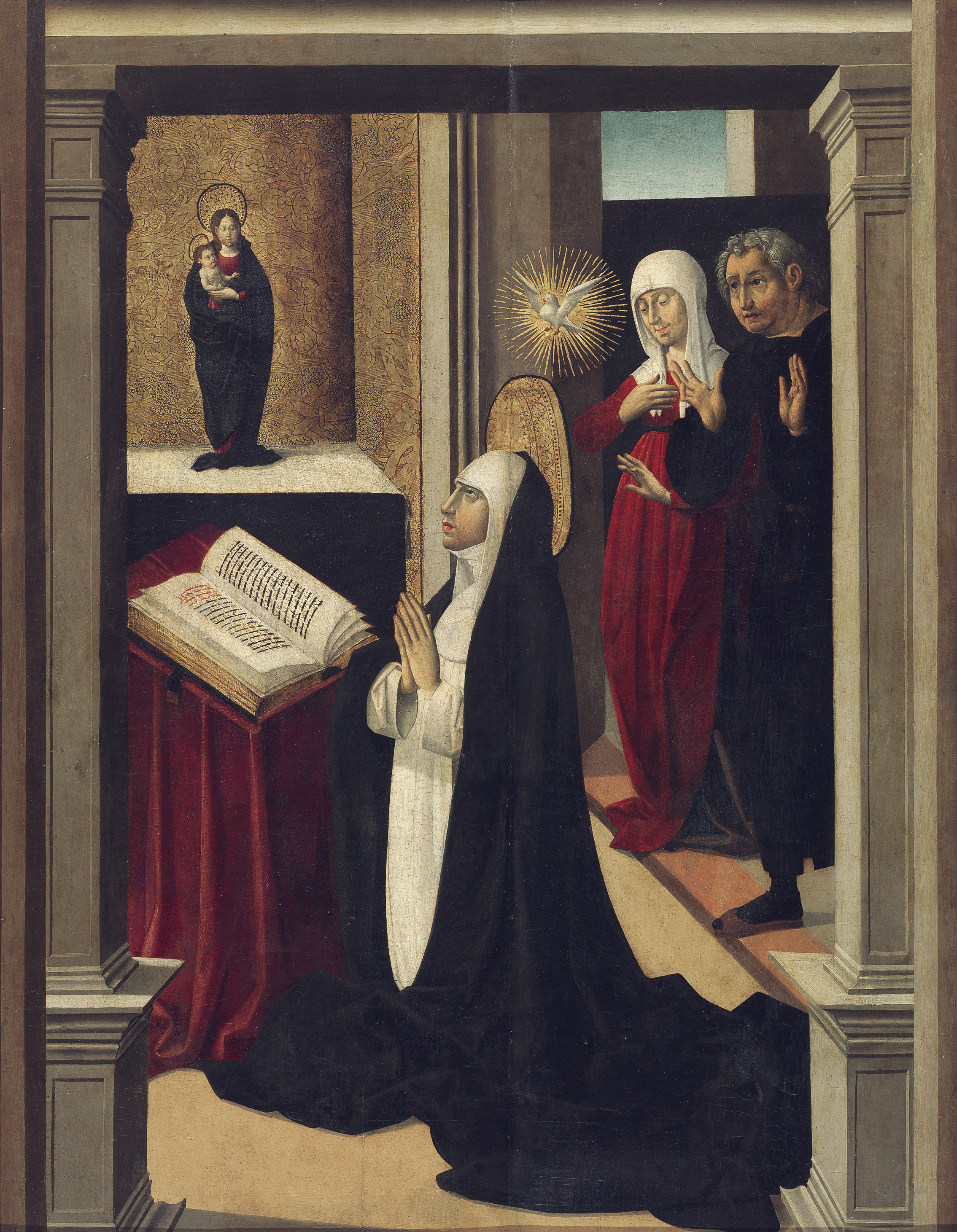 La obra representa a Santa Catalina de Siena, que aparece arrodillada en oración ante una imagen de la Virgen María y el Niño Jesús.